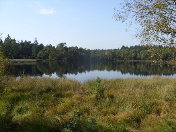 Naturschutzgebiet „Großes und Weißes Moor“